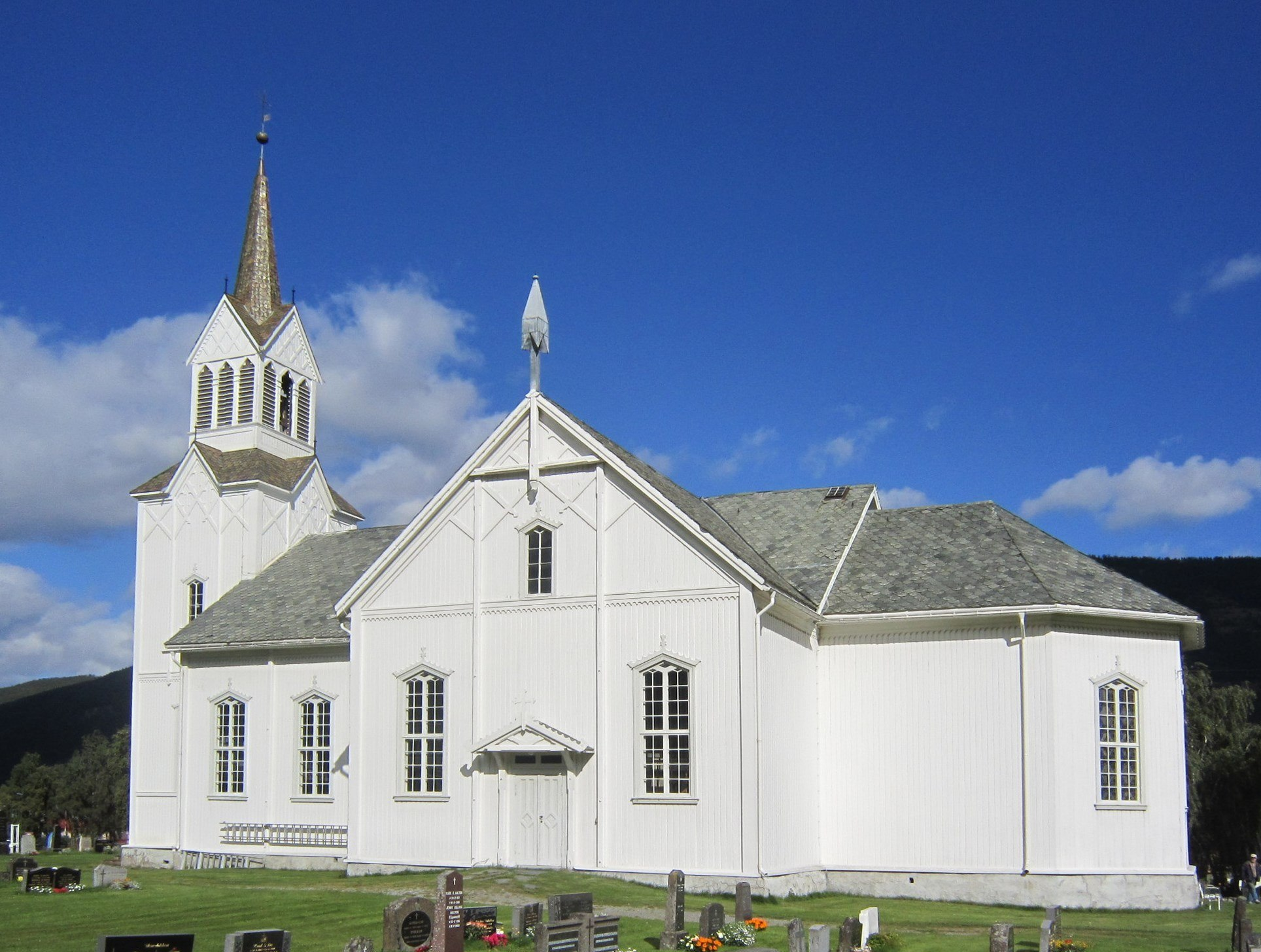 Nes kirke i Nesbyen i Hallingdal